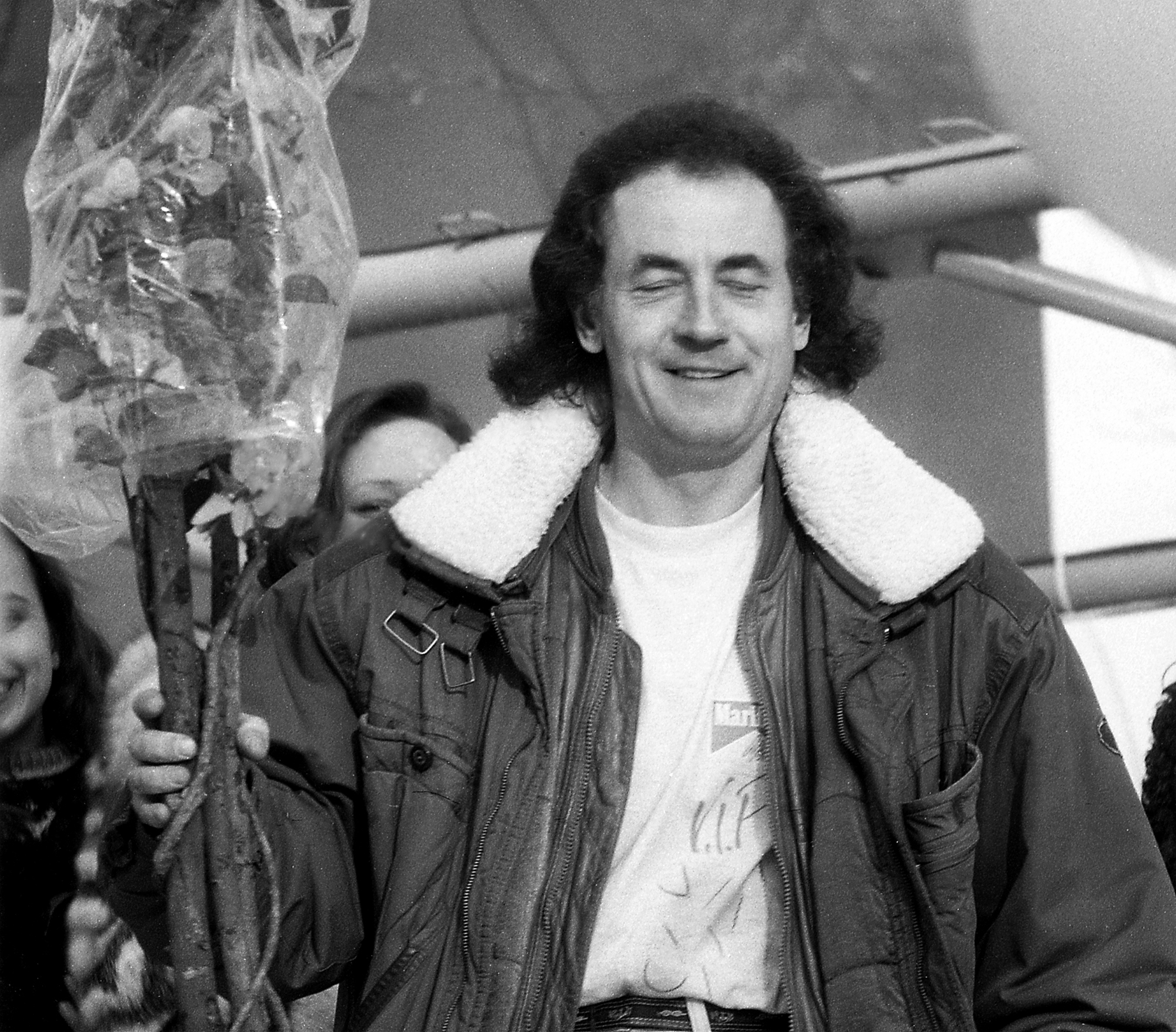 Jaak Joala 94